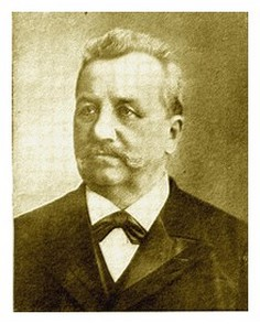 Hofherr Mátyás gyáralapító.